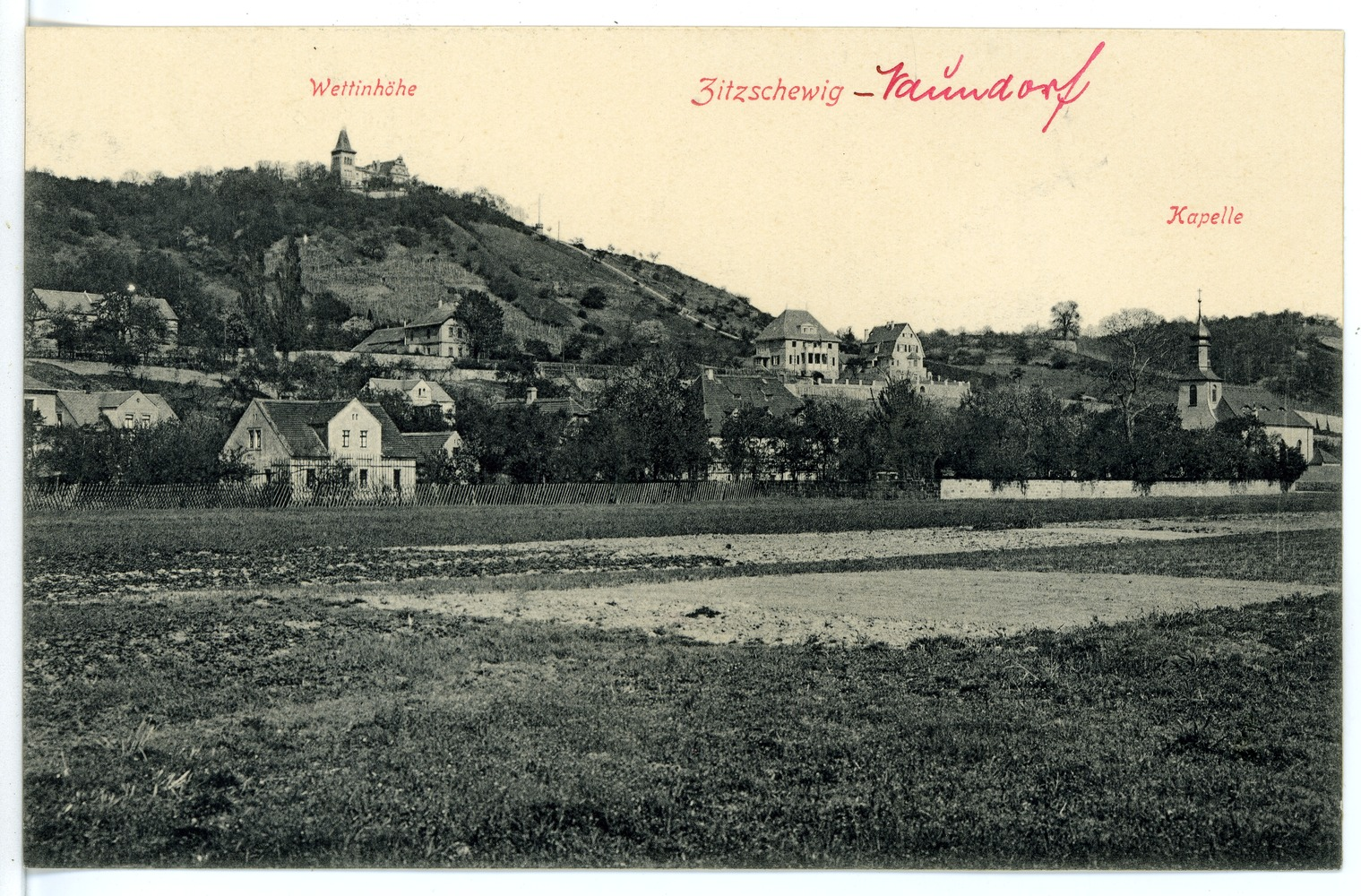 Radebeul; Wettinhöhe und Kapelle This postcard is from publisher Brück & Sohn in Meißen ( postcard has a unique number 15676 and is available in a higher resolution at the publisher. This images was uploaded in a cooperation project between Wikipedians and the publisher.